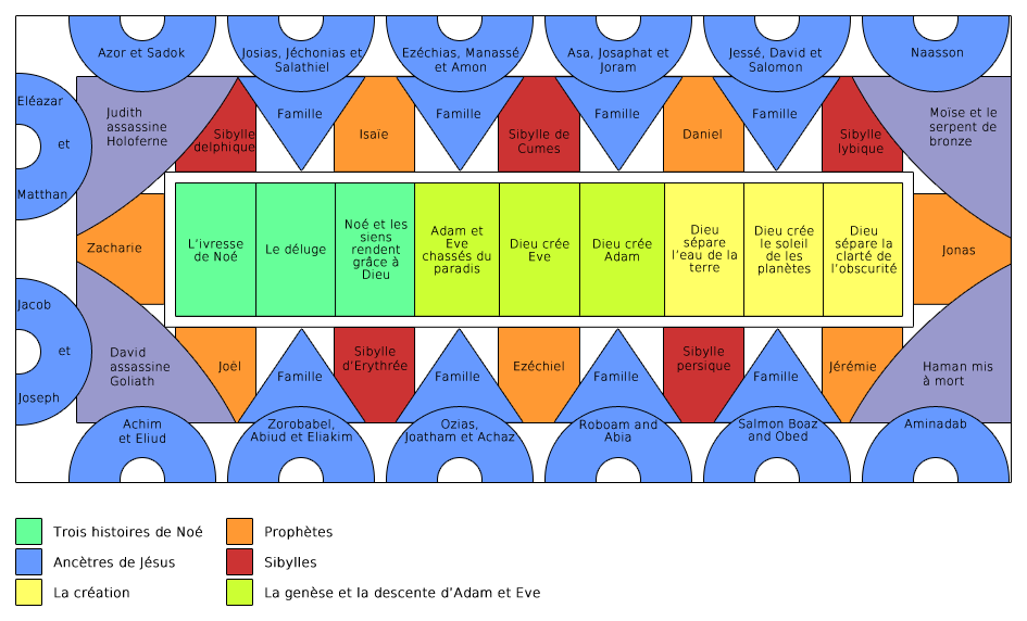 Représentation simplifiée du plafond de la chapelle Sixtine (Vatican).